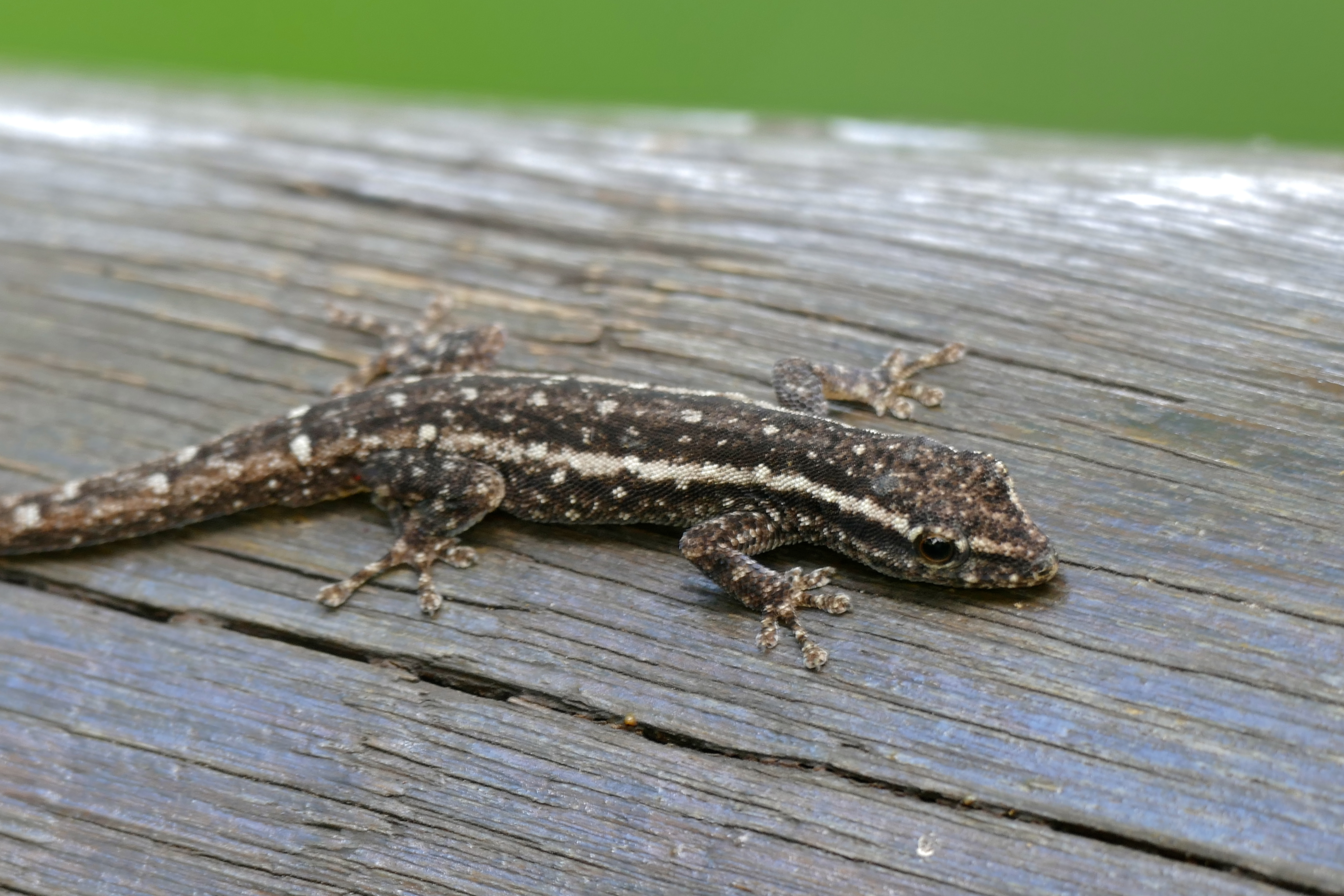 Nursery, Skukuza, Kruger NP, SOUTH AFRICA